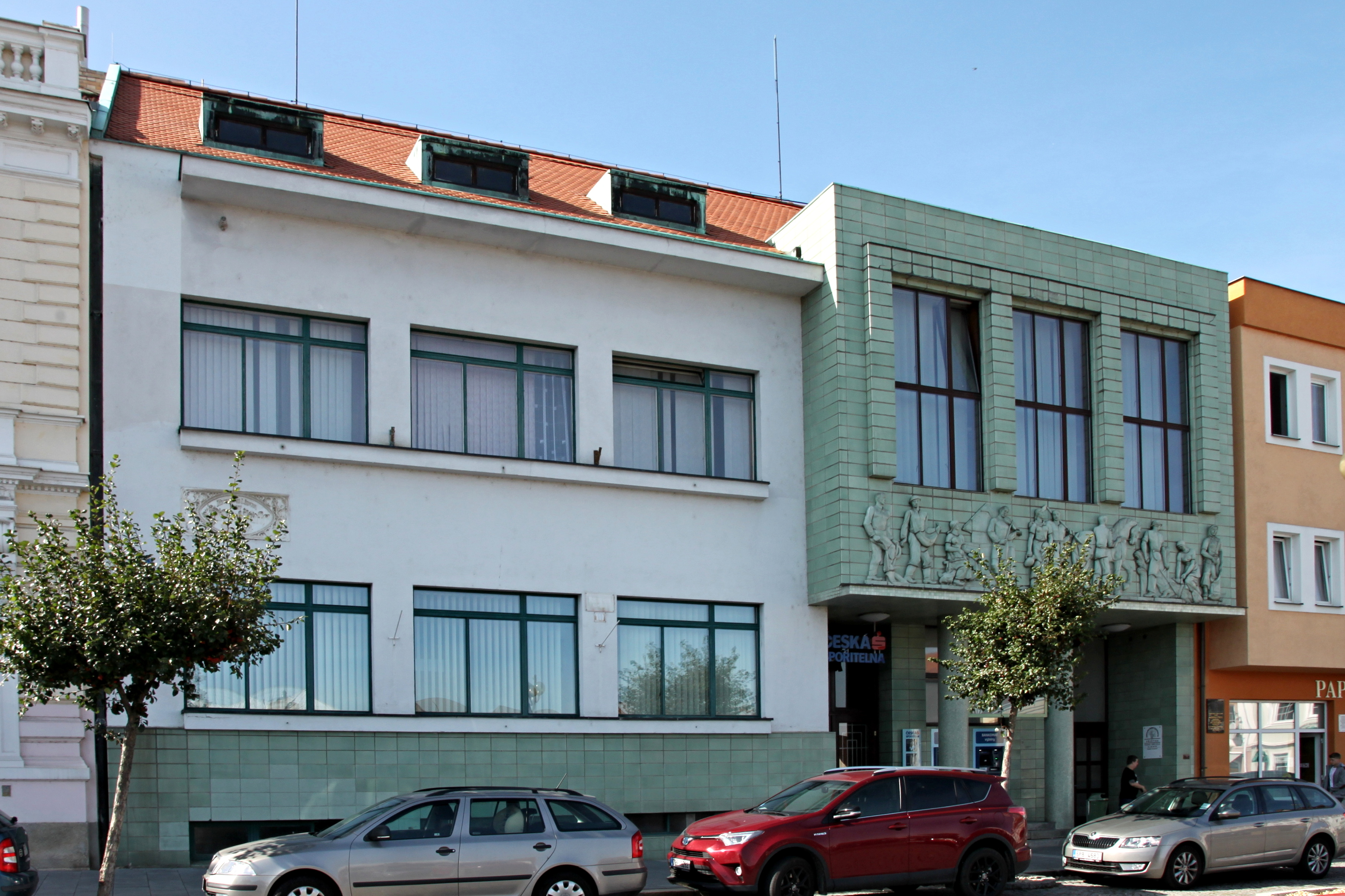 Spořitelna, Masarykovo nám. 111, Přeštice.